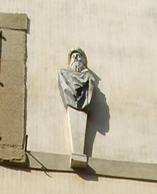 Palazzo dei visacci, luigi alamanni